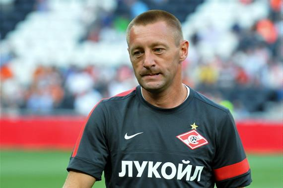 Андрій Тихонов — російський футболіст і тренер